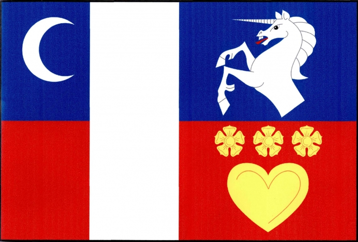 vlajka, Radkova Lhota, okres Přerov